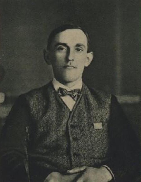 Franz Donth, československý lyžař-běžec na lyžích německé národnosti